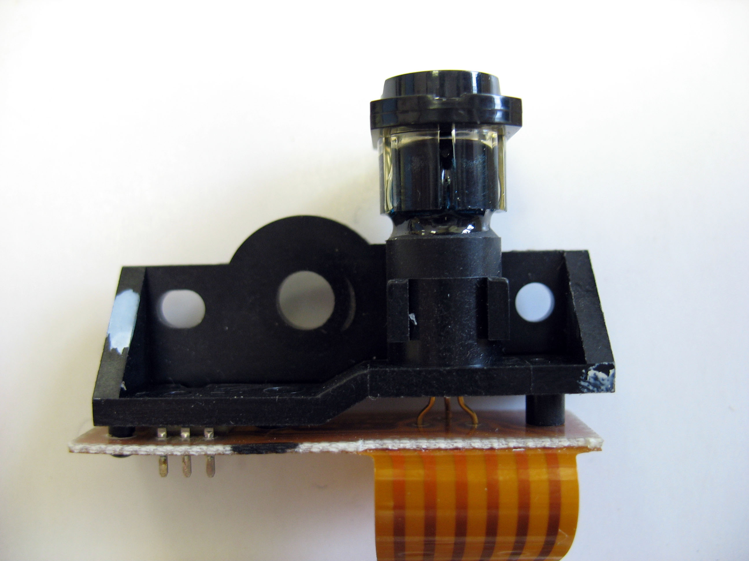 Laser LED from HP LaaserJet5L printer